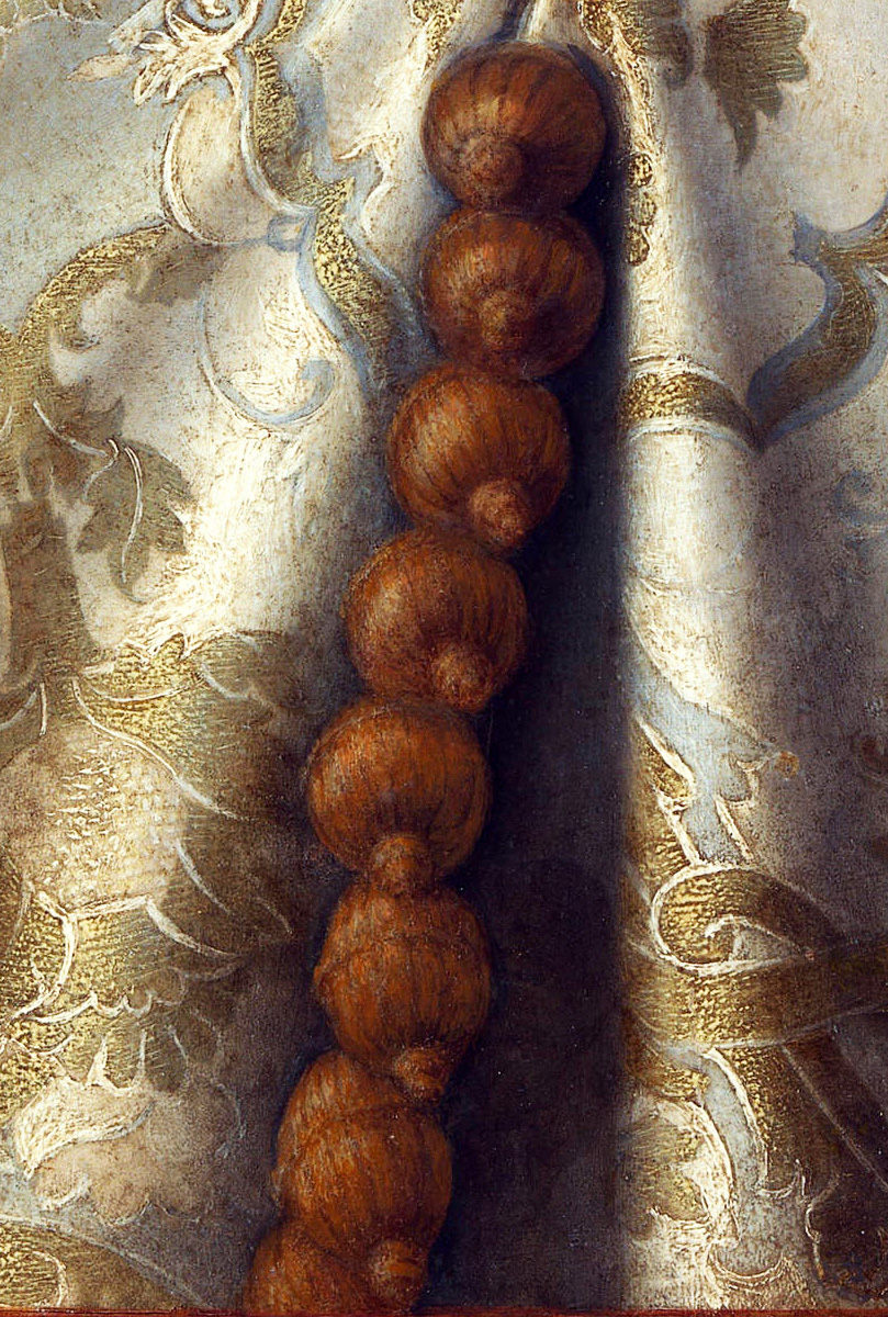 Пуговицы. Фрагмент "Портрета дожа Леонардо Лоредано" кисти Джованни Беллини, 1501